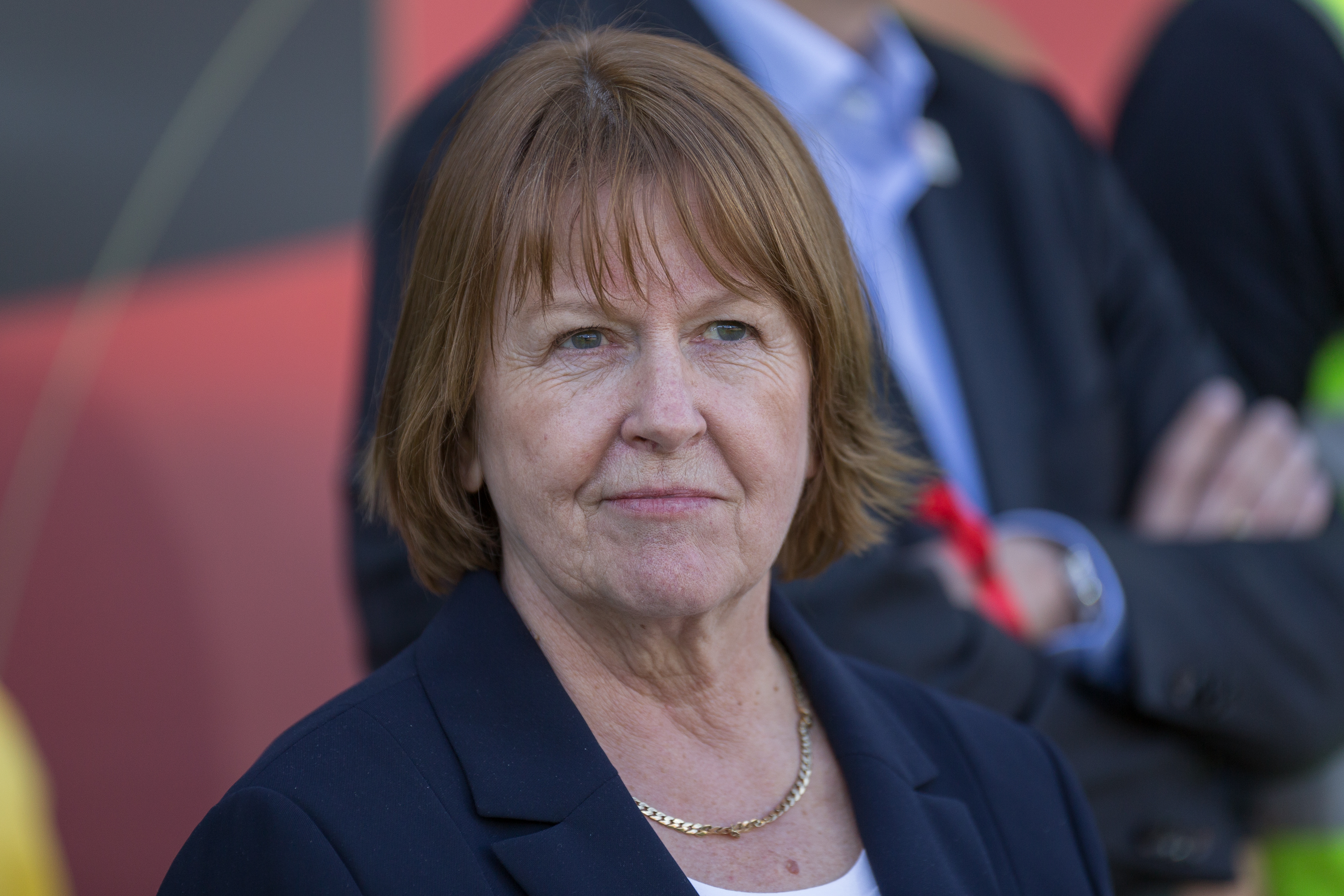 Hannelore Ratzeburg (DFB-Vizepräsidentin für Frauen- und Mädchenfußball); Porträt, Einzelbild